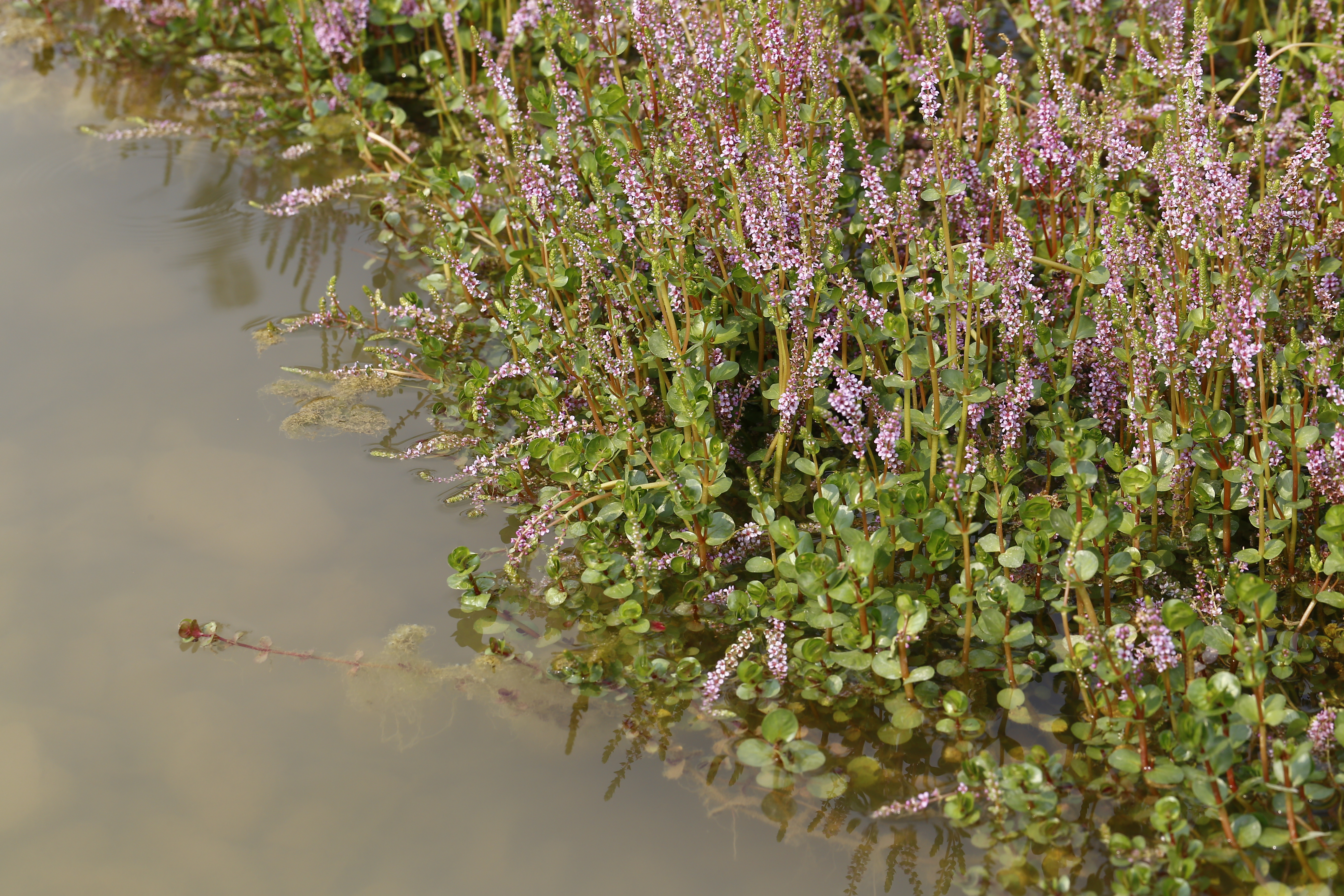 中文（台灣）: 圓葉節節菜的族群-b